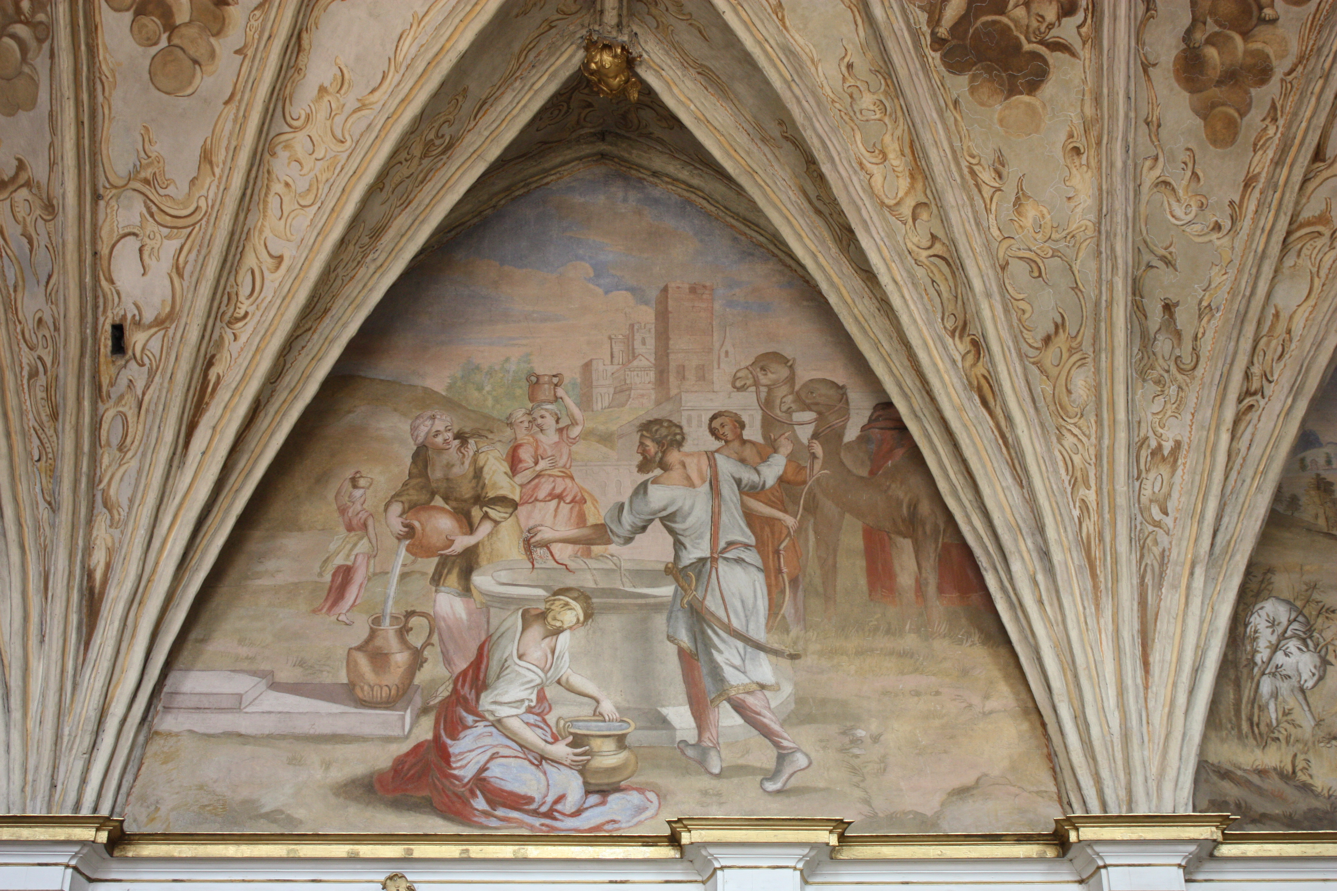 Lidzbark Warmiński, zamek biskupi, ob. muzeum, XIV, XIX